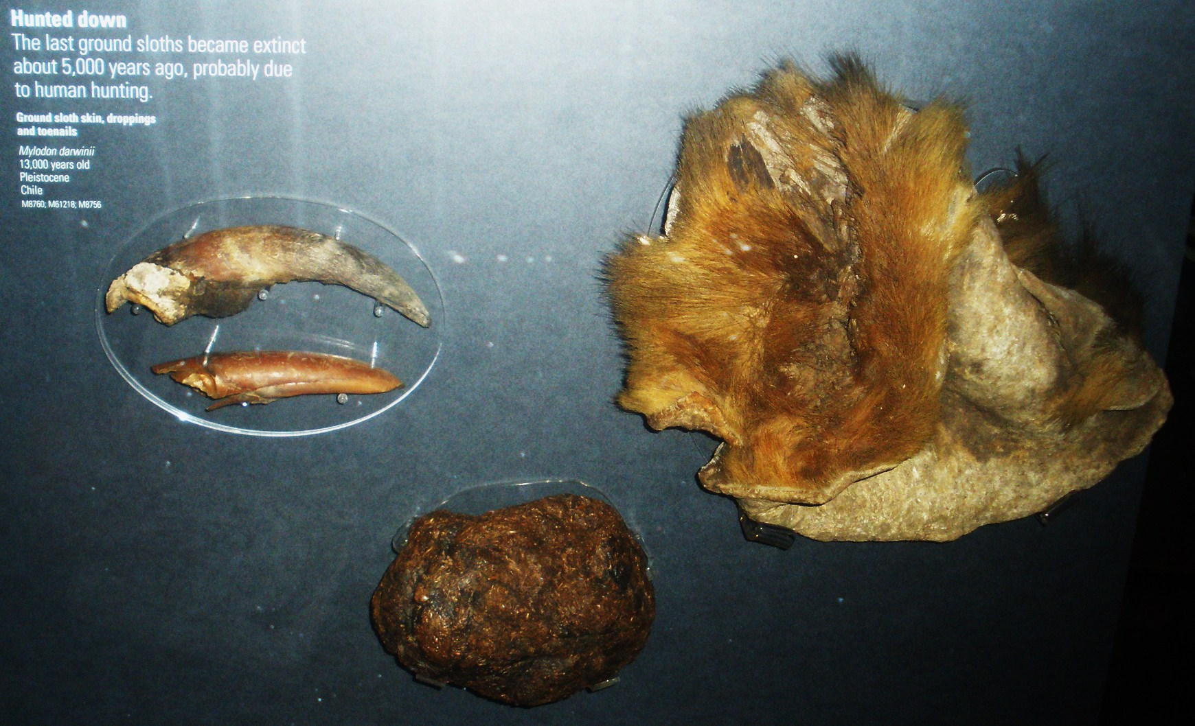 Fossil of Mylodon, an extinct mammal-- Took the photo at Natural History Museum, London